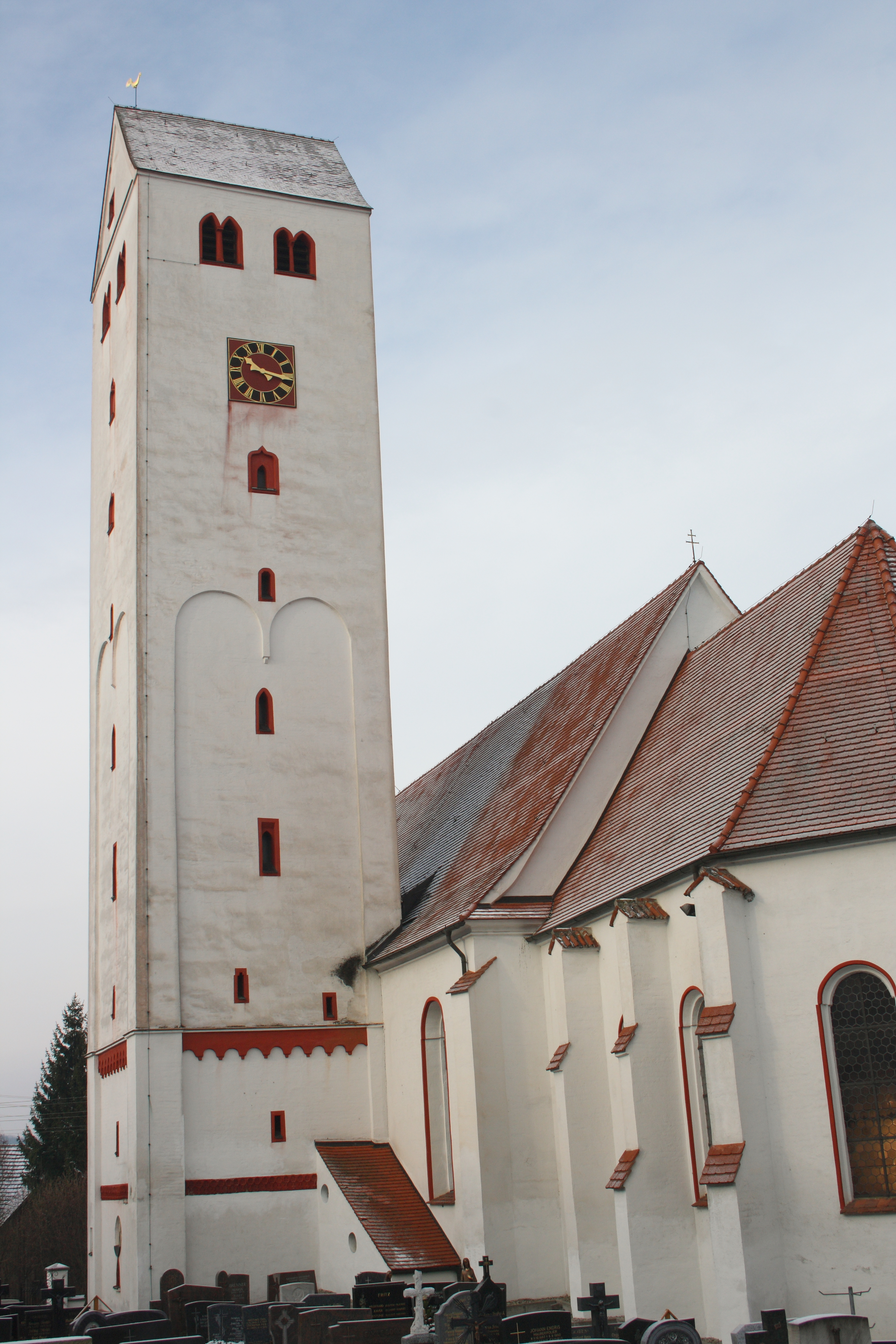 Katholische Pfarrkirche St. Georg in Aislingen im Landkreis Dillingen an der Donau, Ansicht von Südosten, Apsis und Satteldachturm